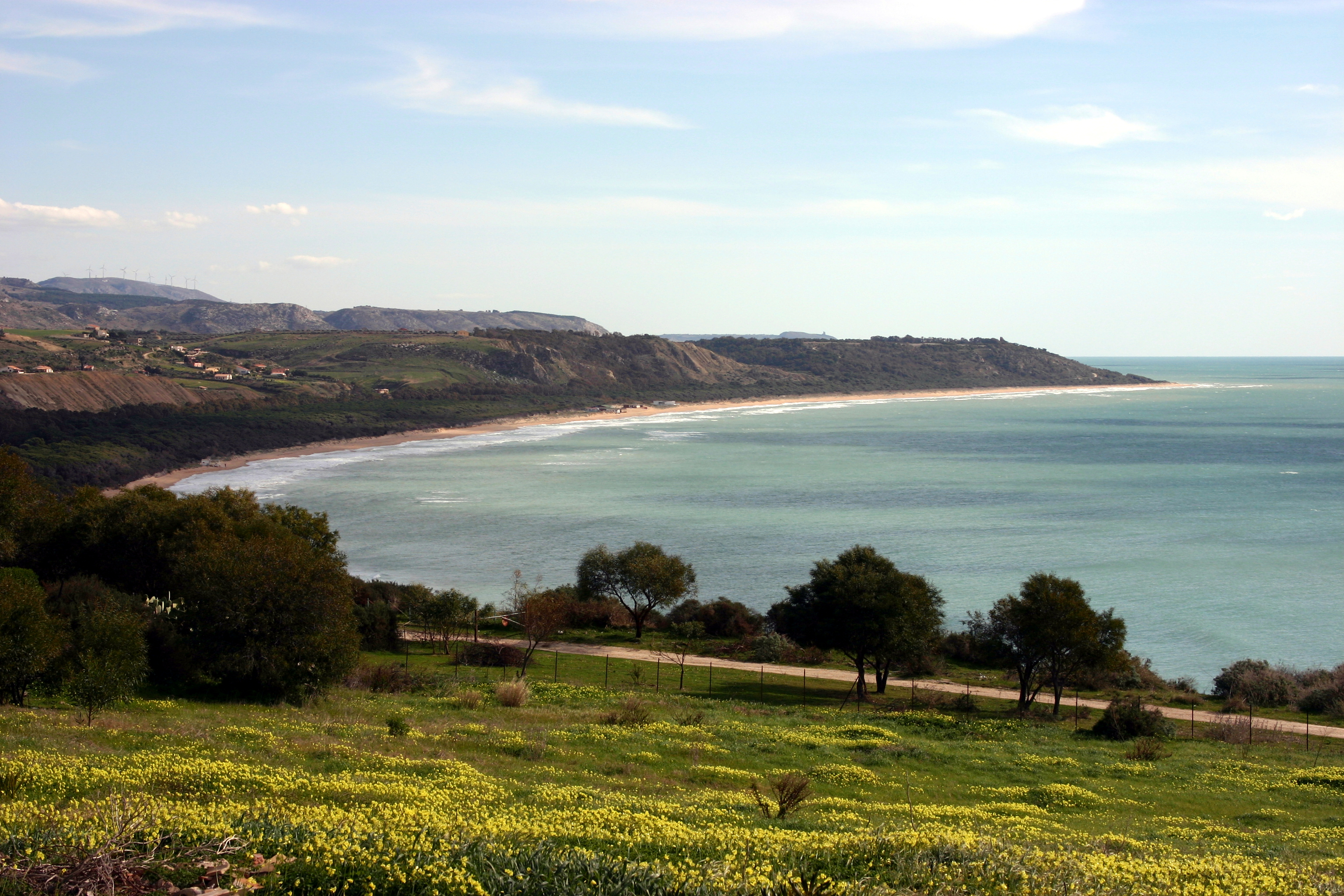 Heraclea Minoa